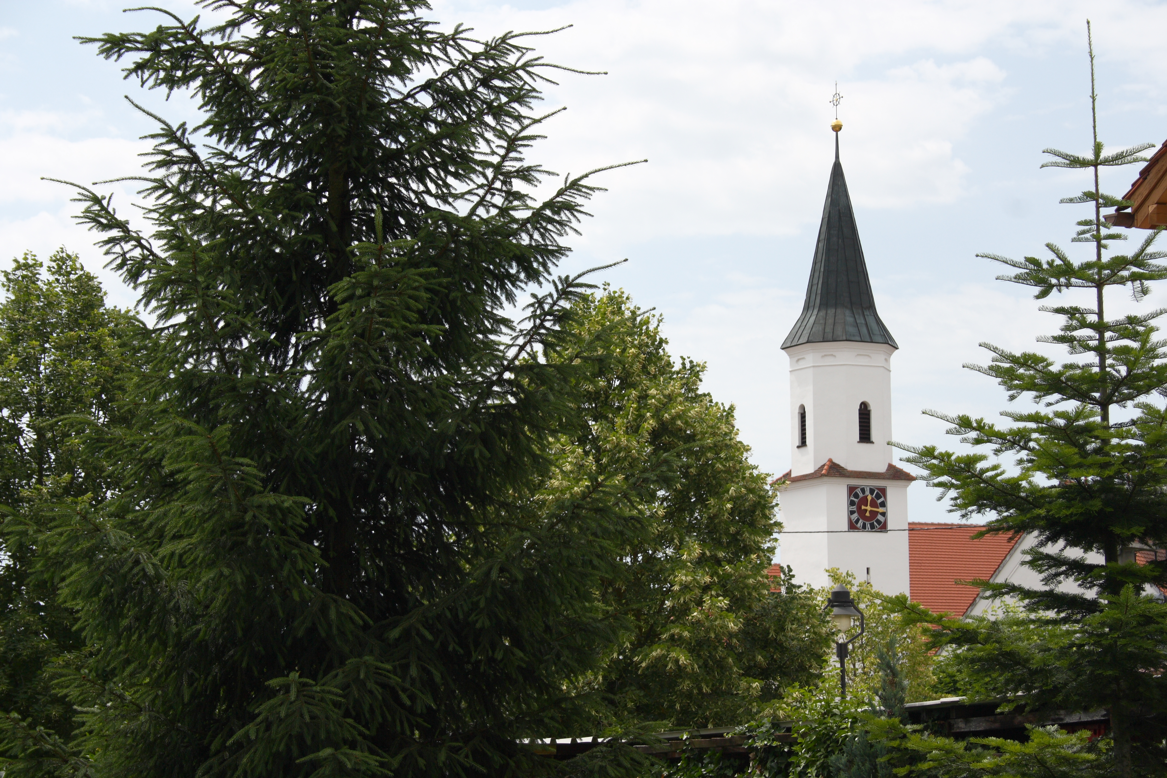 Katholische Pfarrkirche Hl. Kreuz in Landensberg